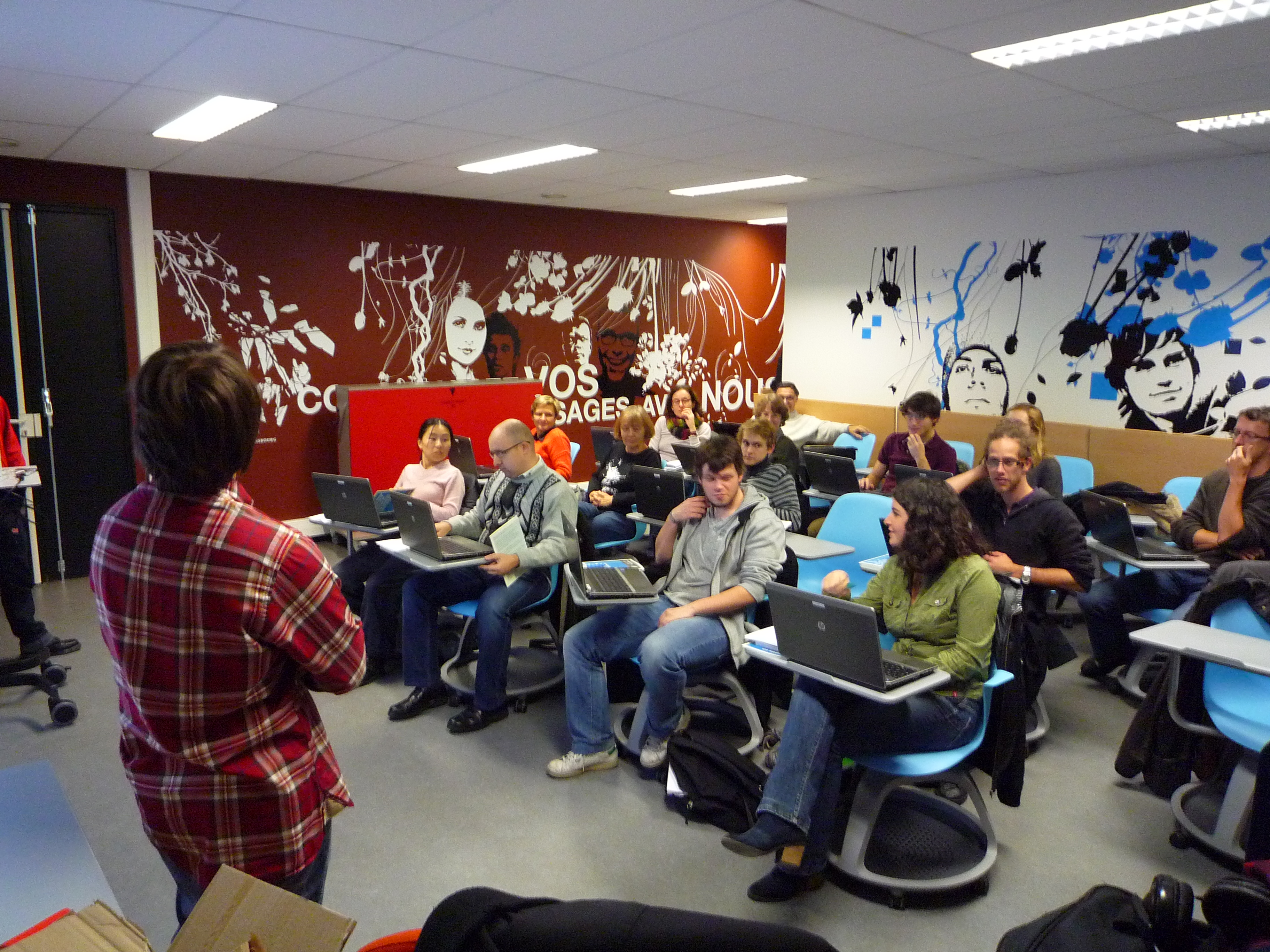 Premier atelier de découverte Wikipédia Strasweb au Centre de Culture Numérique de l’Université de Strasbourg le 8 novembre 2012